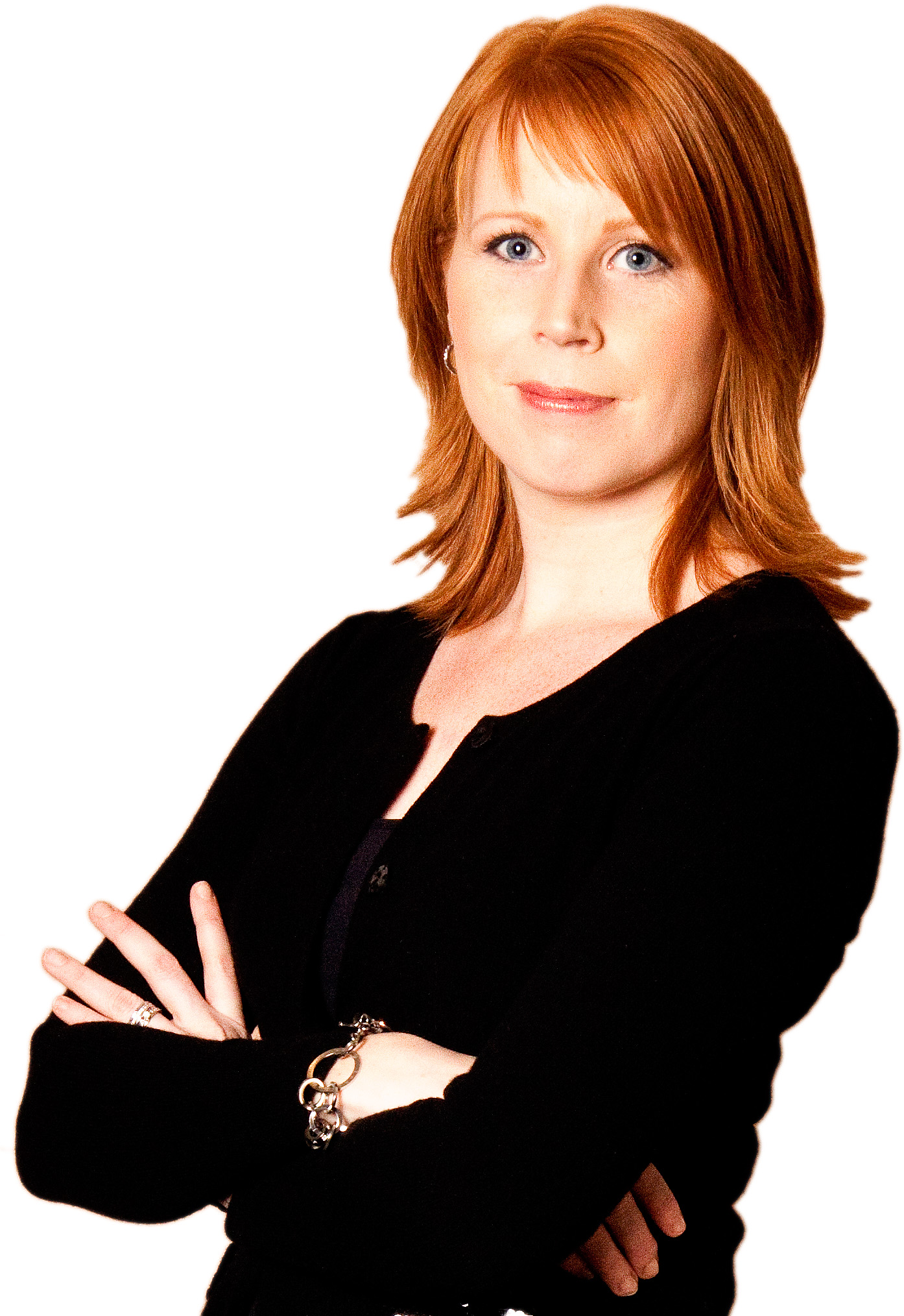 För fri publicering (ej för reklam eller marknadsförings syfte) ange fotograf Anna-Karin Nyman